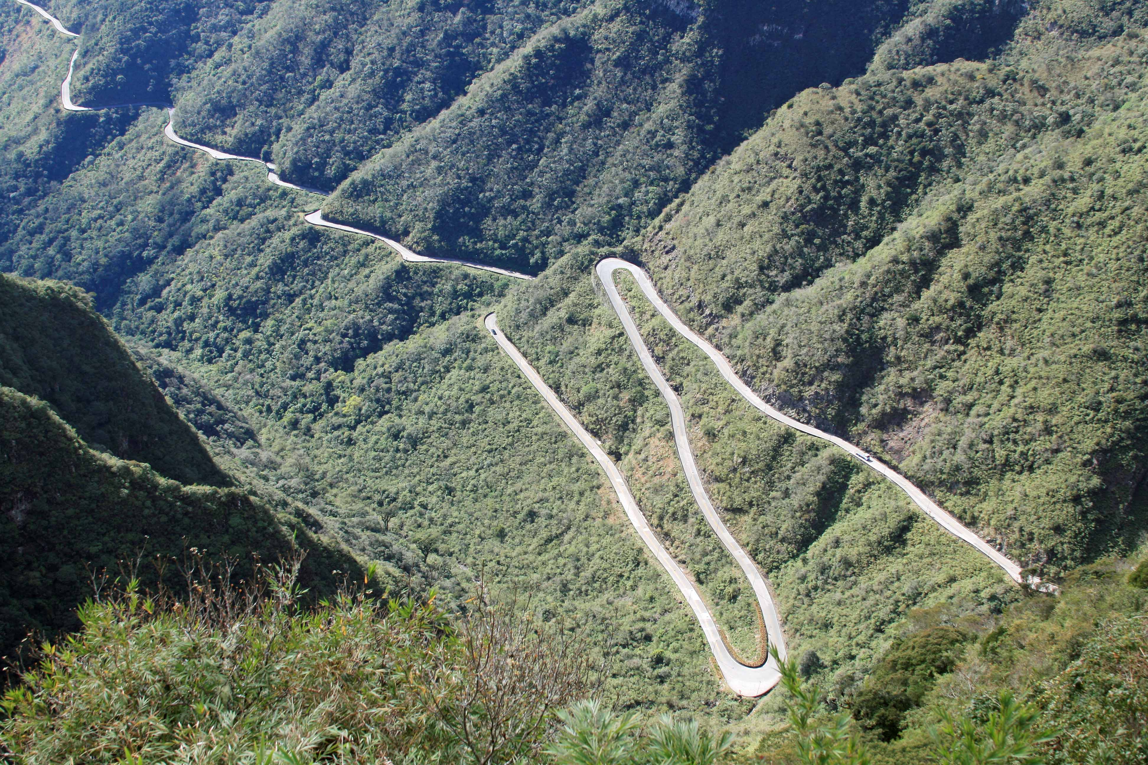 A Serra do Rio do Rastro, com seus 12 quilômetros em meio à Serra Geral, liga a região serrana (São Joaquim) com o litoral de Santa Catarina.